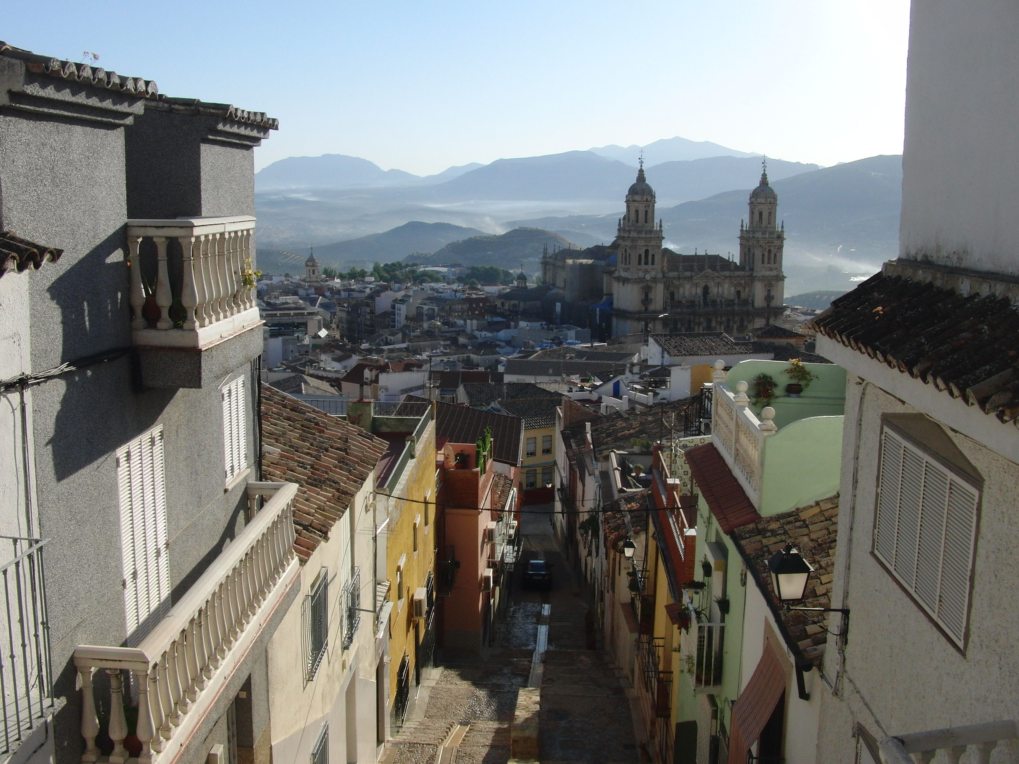 Jaén desde el mirador